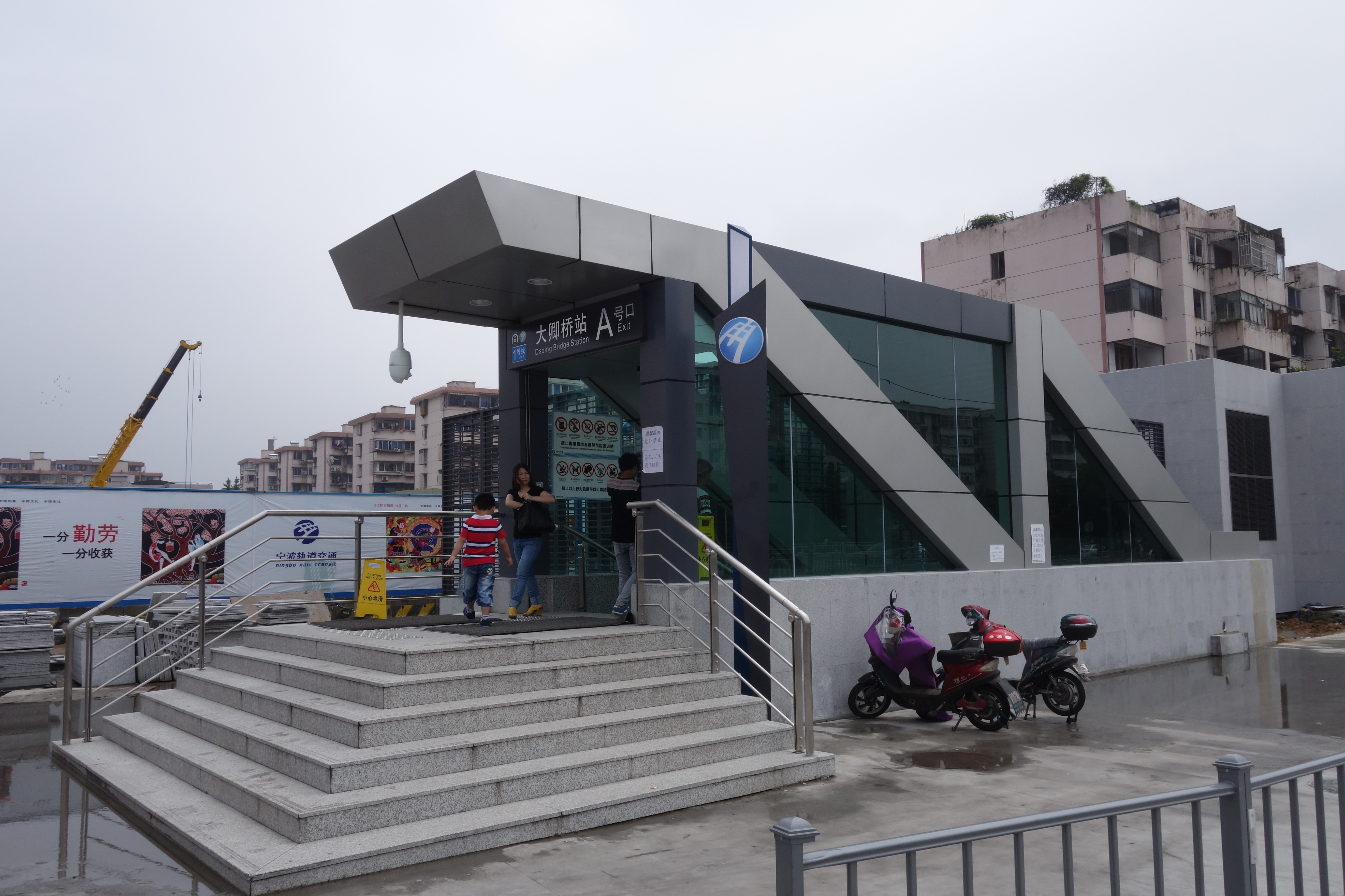 大卿桥站A口